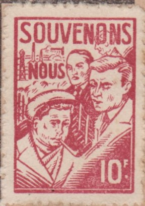 Vignette émise en 1947 par la Fédération des travailleurs de la métallurgie CGT, apposée par les syndiqués sur leur carte d'adhérent. Jean-Pierre Timbaud est figuré au premier plan, en casquette.